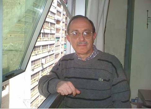 Foto de Kado Kostzer en Tucumán. En la redacción del diario El Siglo.